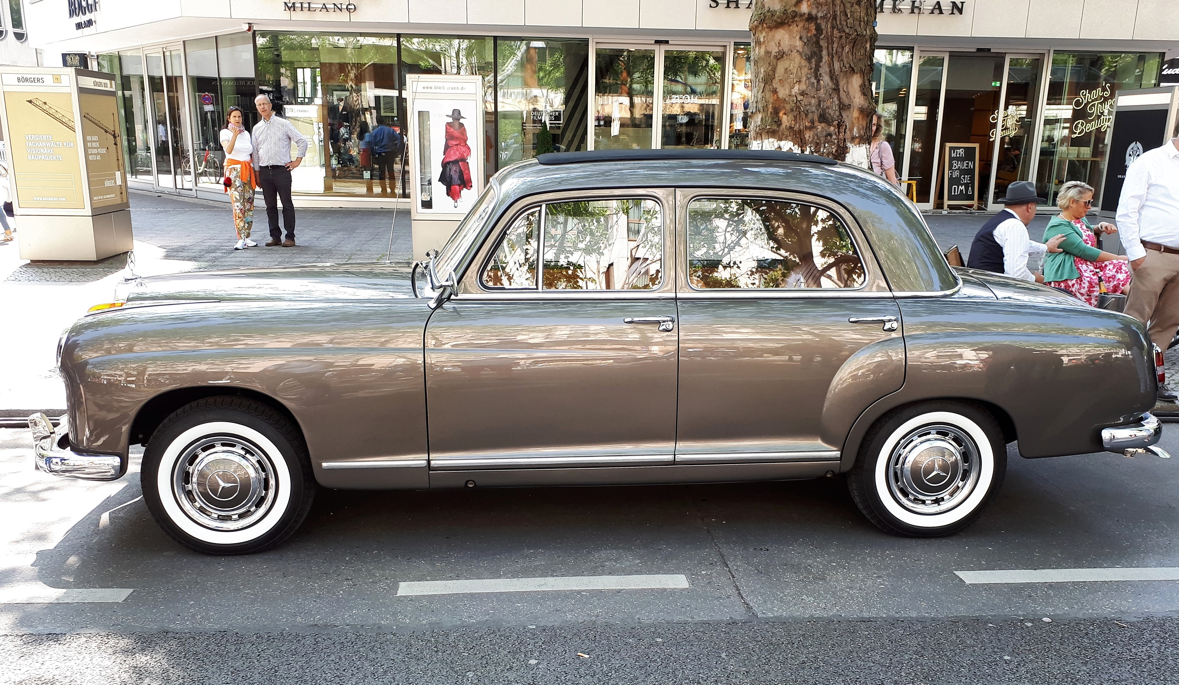 Classic Days Berlin 2019 Mercedes 219